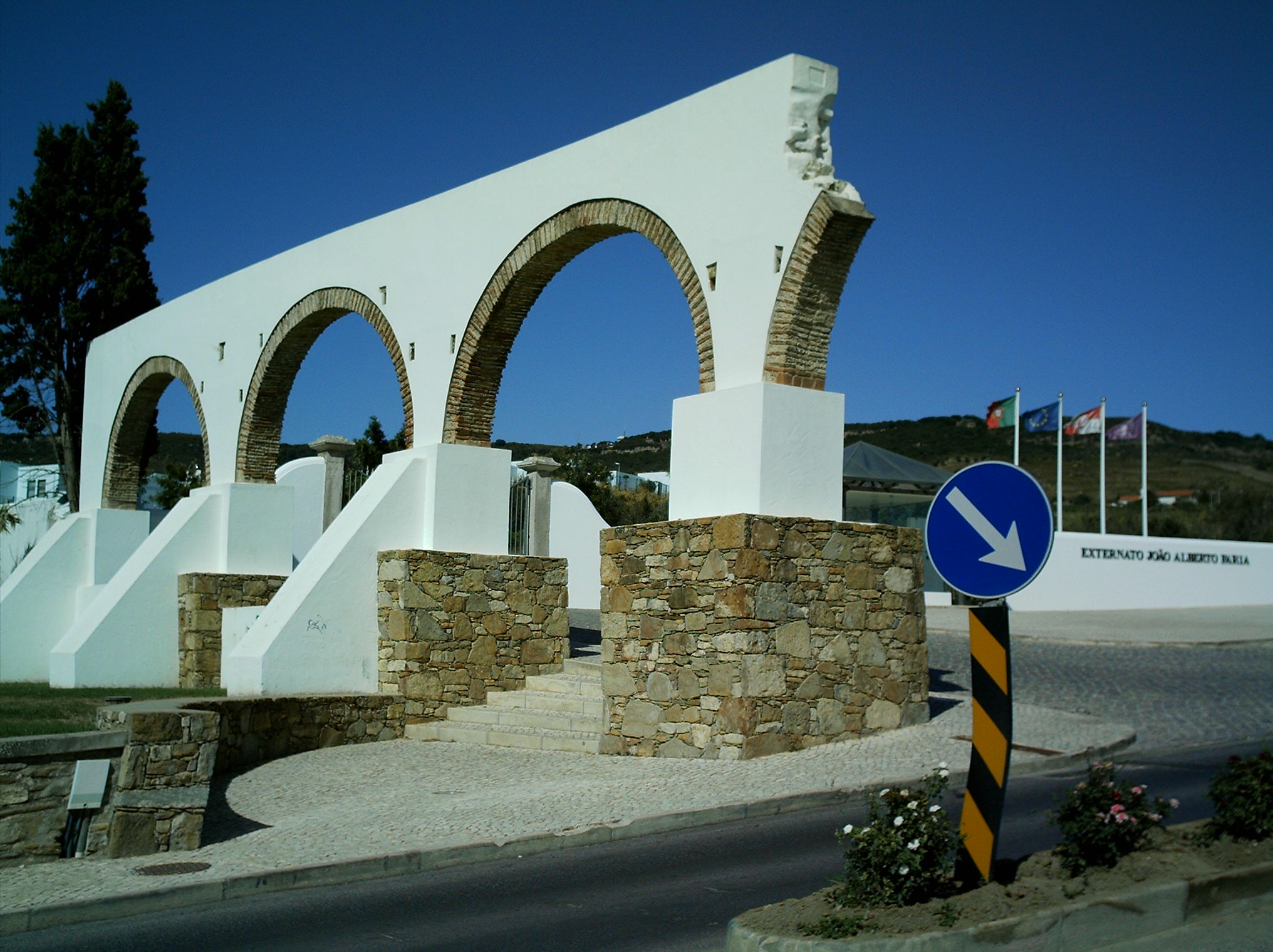 Aqueducto de Arruda dos Vinhos